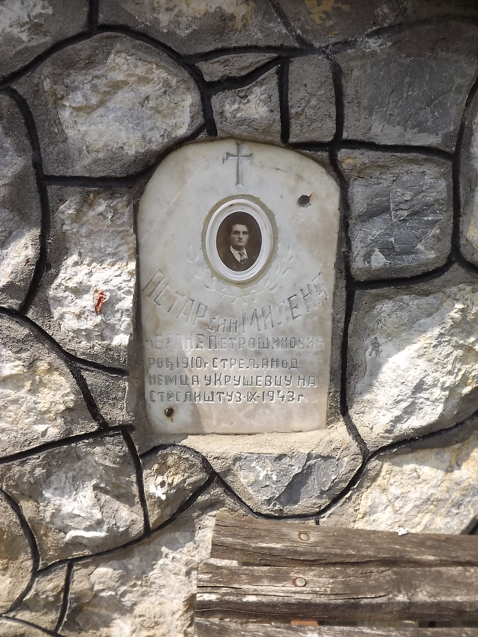 Srpski (latinica): Spomenik borcima u oslobodilackim ratovima, selo Brezovica. Fotografija nastala u okviru saradnje Narodnog univerziteta Trstenik, Narodne biblioteke Jefimija i Saveza boraca Trstenik.